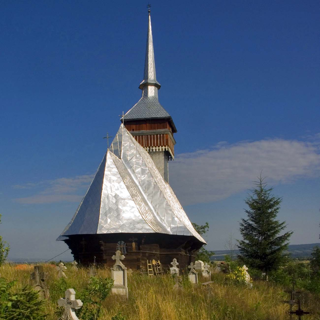 Biserica de lemn din Brădet, Bihor, vedere din dosul bisericii.